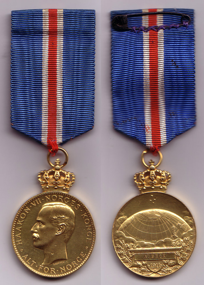 Sydpolmedaljen gitt til deltakere på Roald Amundsens sydpolekspedisjon.